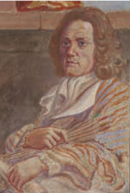 Edini znani avtoportret avtorja